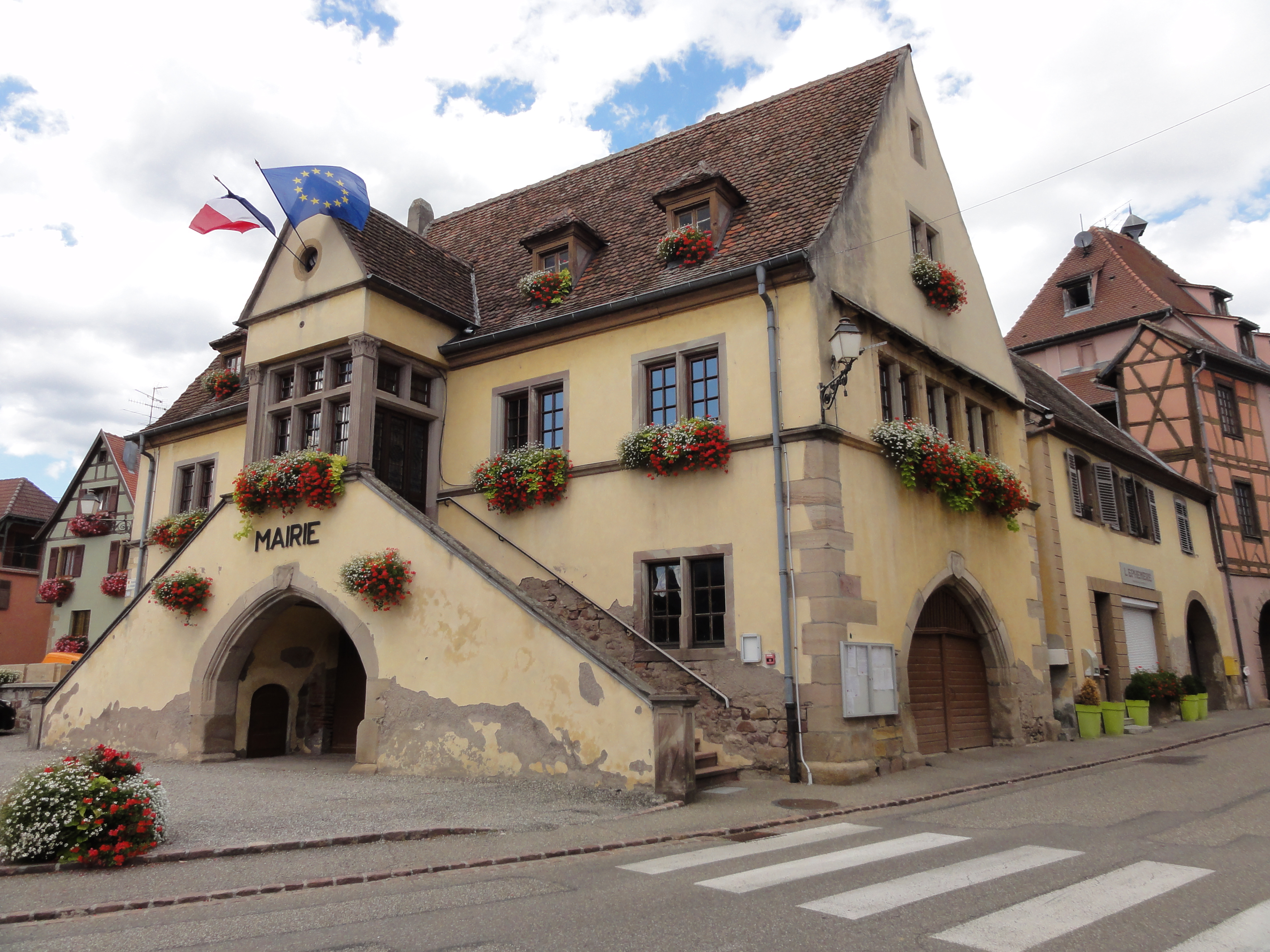 Alsace, Haut-Rhin, Hattstatt, Mairie (1554-XXe), place de Verdun.